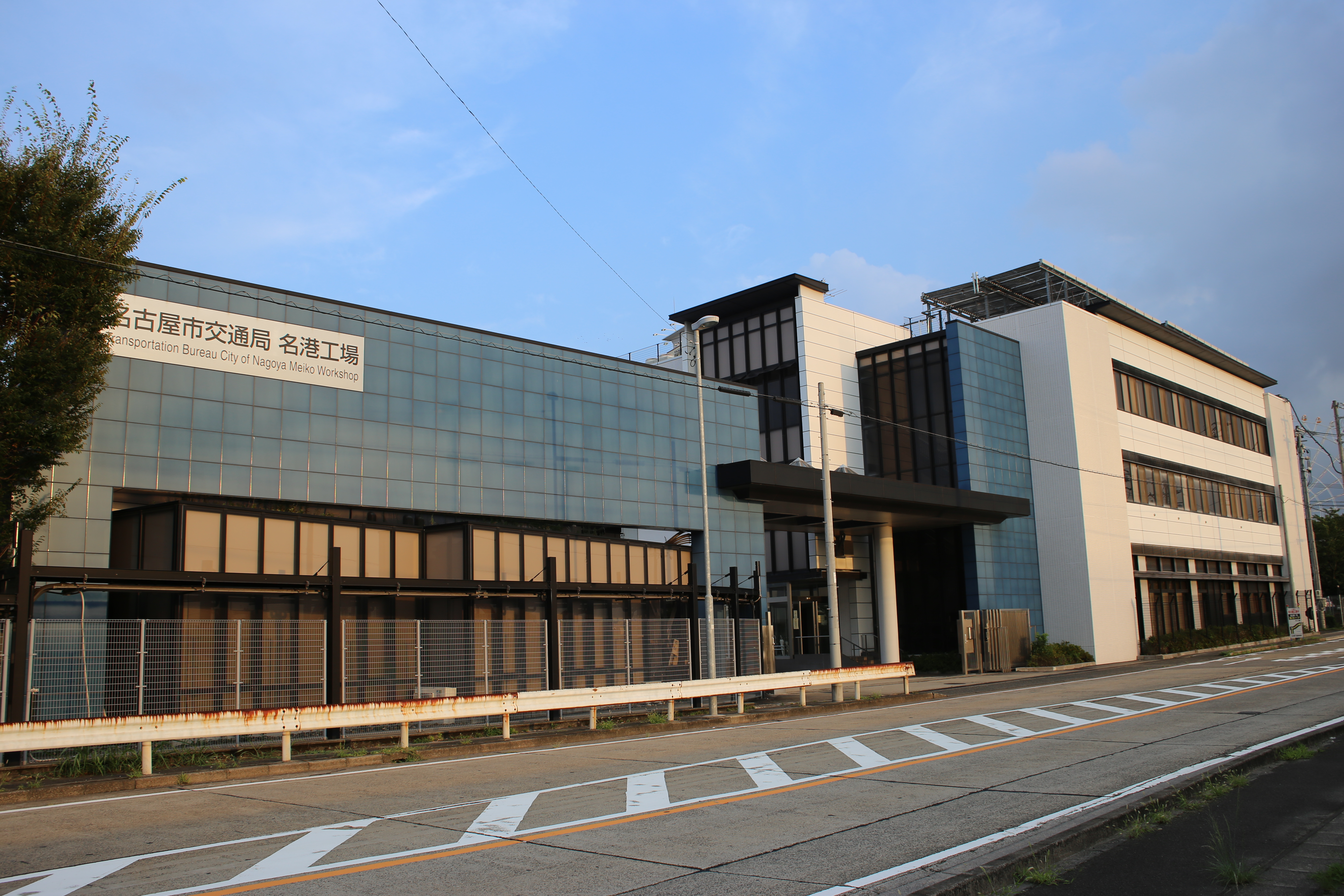 名古屋市港区の名古屋市交通局名港工場を西側公道北側より撮影